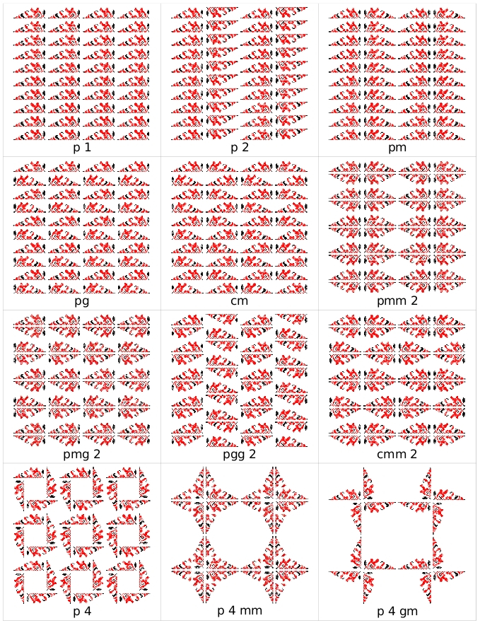 симетрия